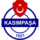 Kasımpaşa SK'nin eski logosu (1996-2012).